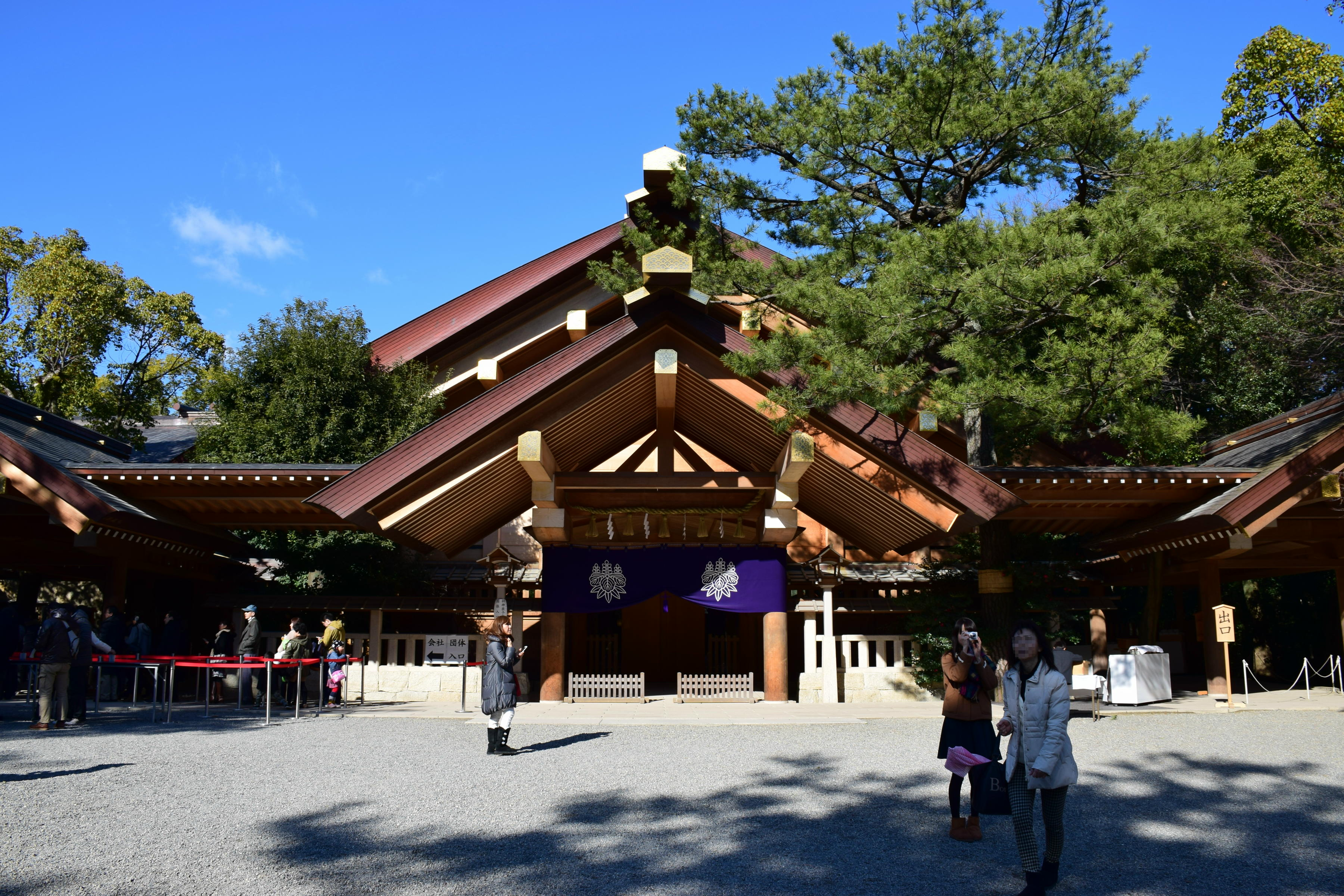 Kaguraden